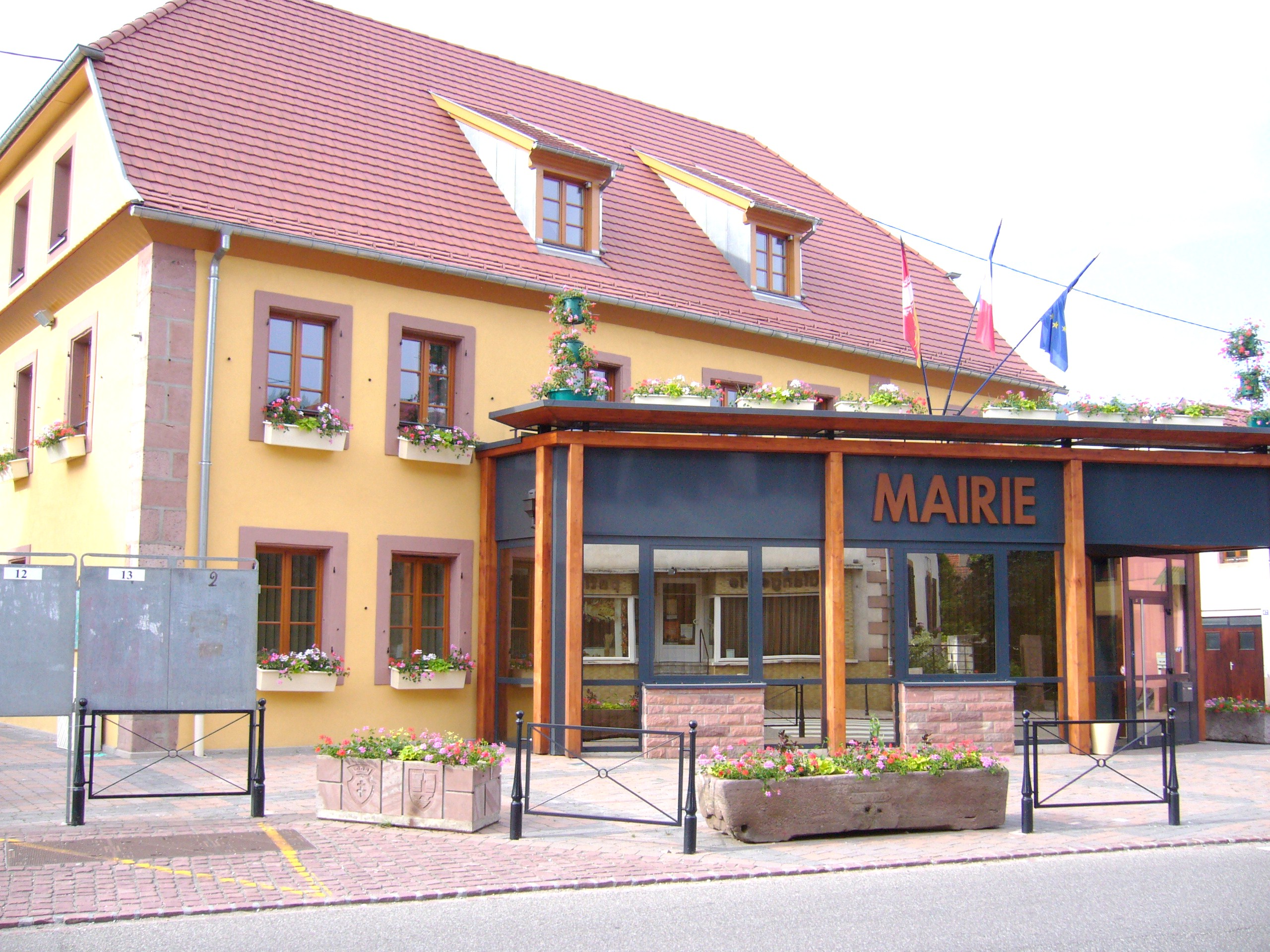 Lièpvre 020.JPG